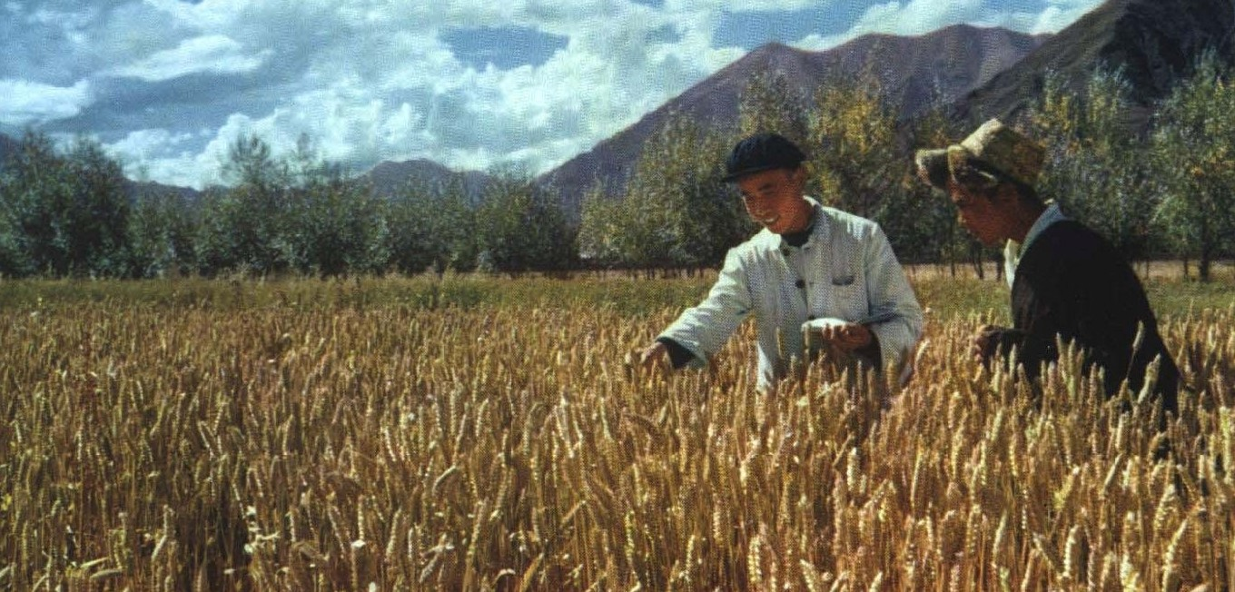 1964-06 1964年 西藏 改良麦田